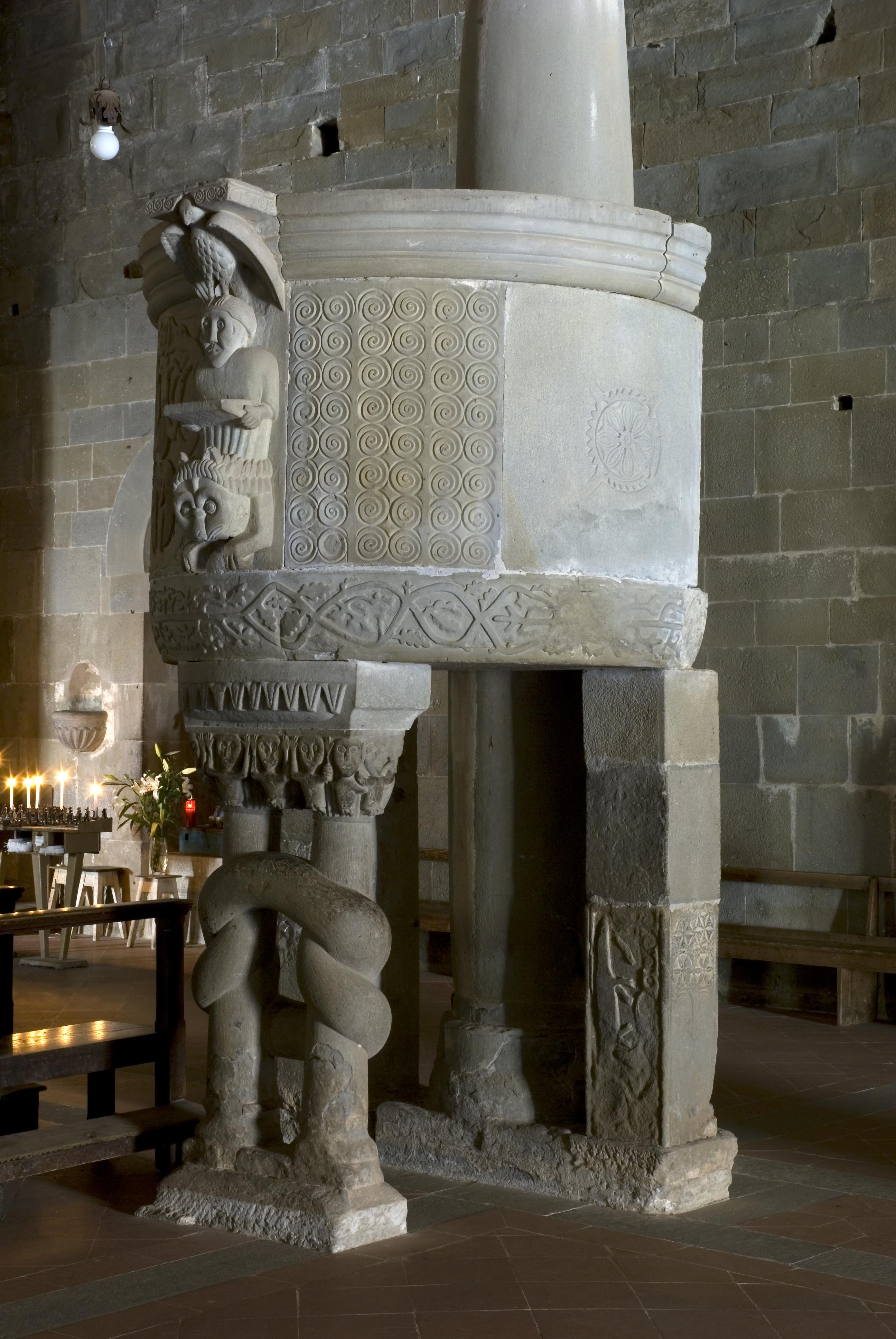 Pulpito posto nella chiesa di Gropina (Loro Ciuffenna)